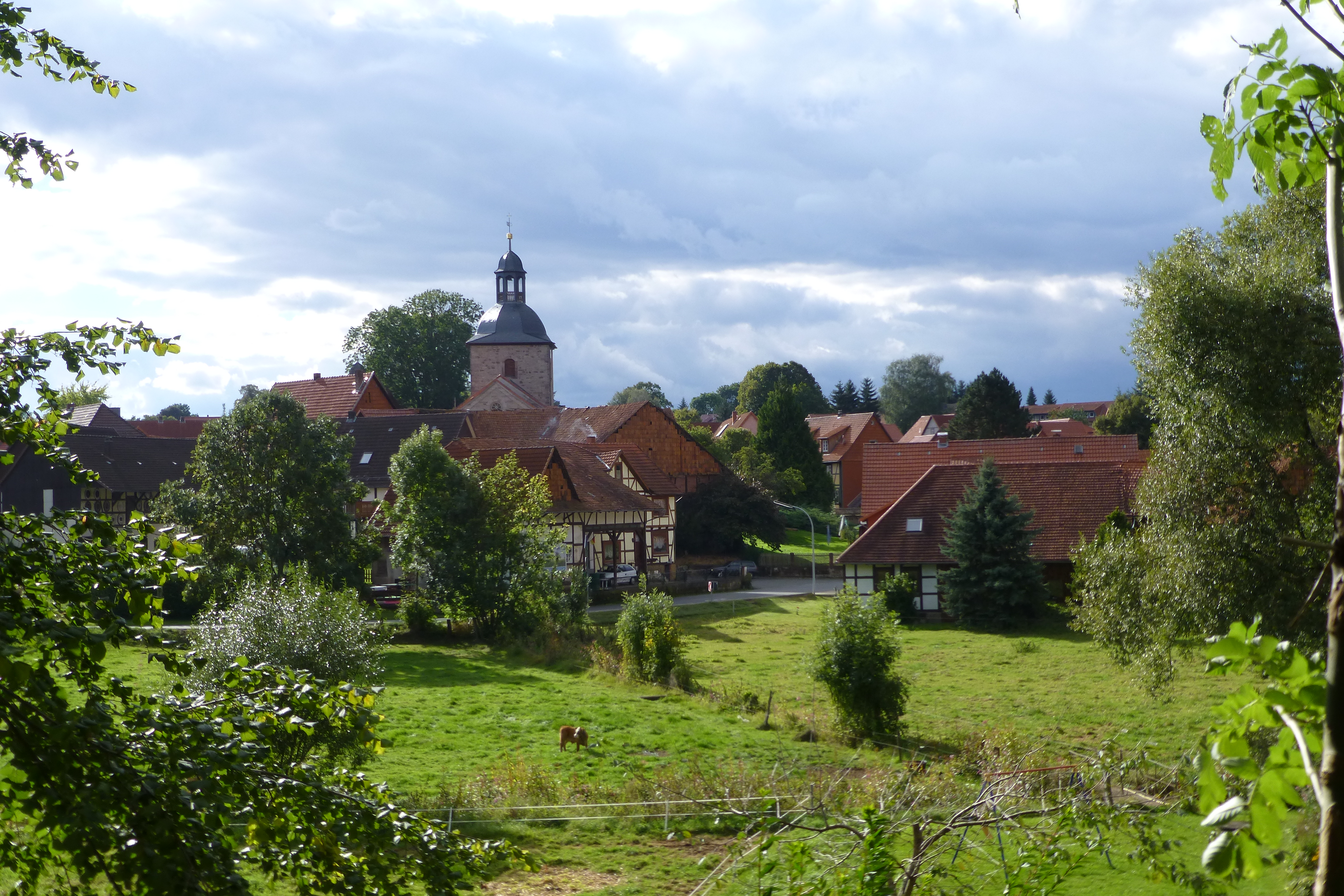 Kerstlingerode, Gemeinde Gleichen, Südniedersachsen. Blick von Osten über das Gartetal